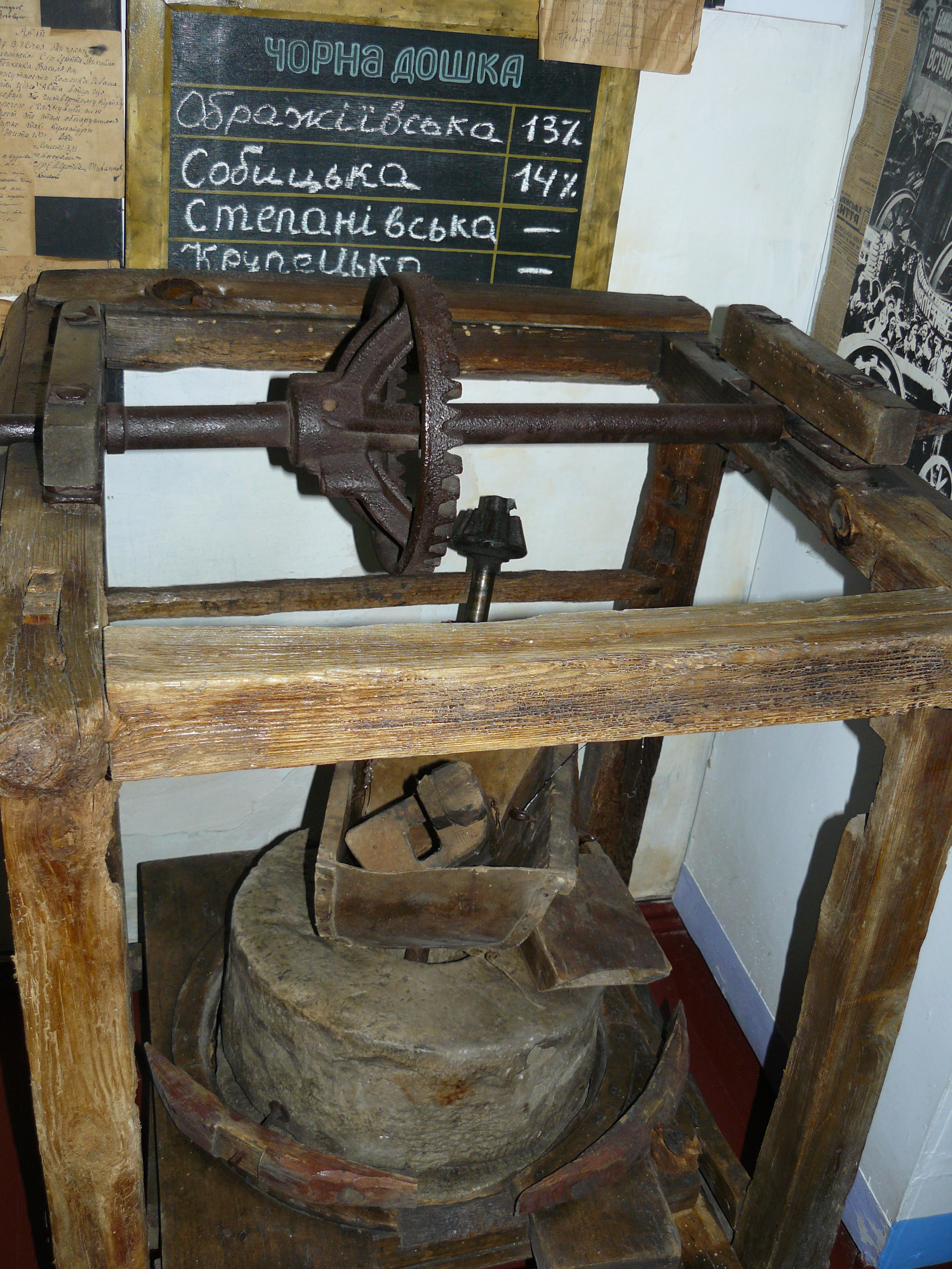 Історико-краєзнавчий музей у Лебедині